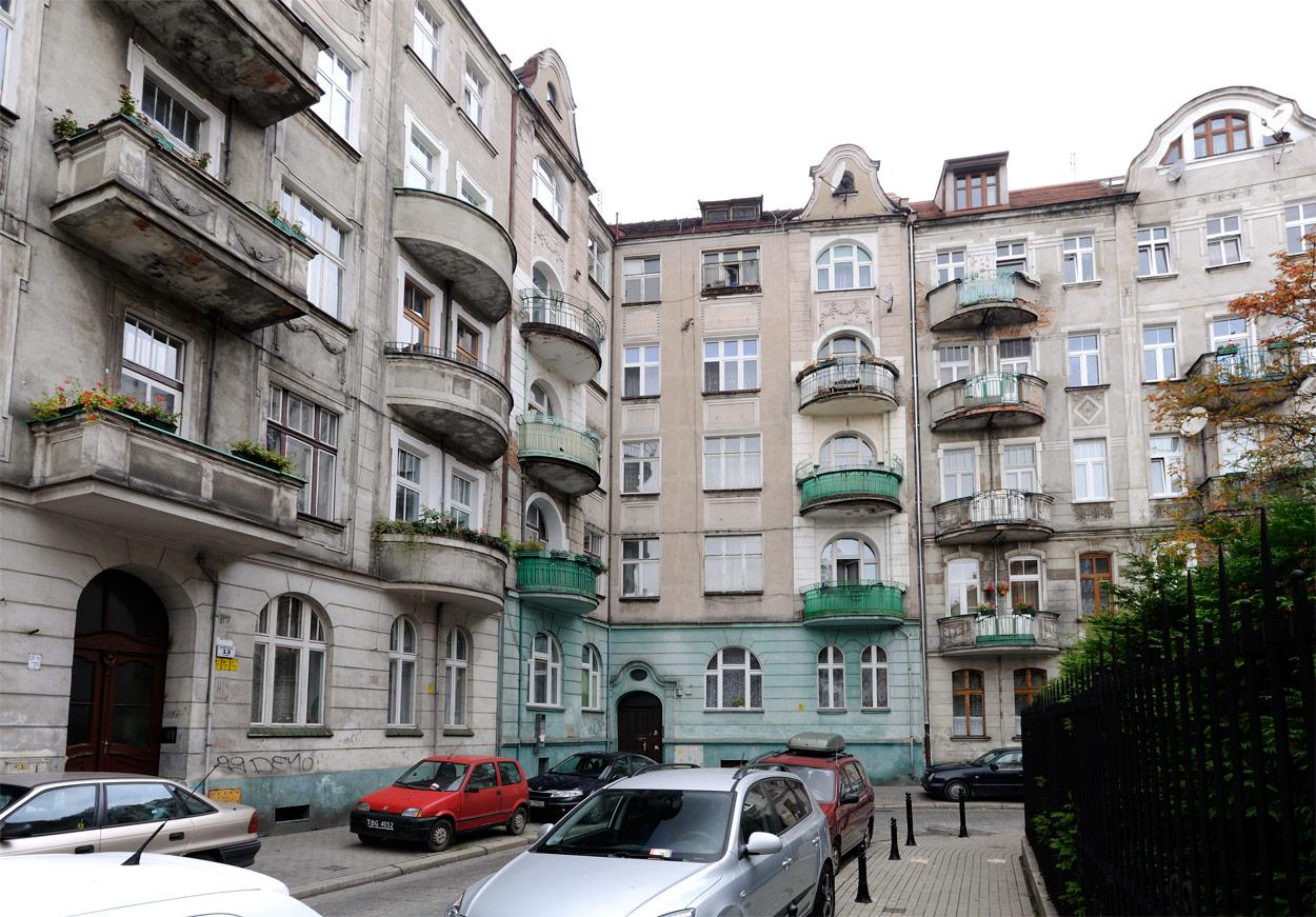 Kamienica numer 11.